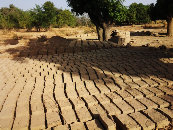 Montre la confection de briques en banco, qui accélère l'érosion hydrique au sein du village de Péyiri